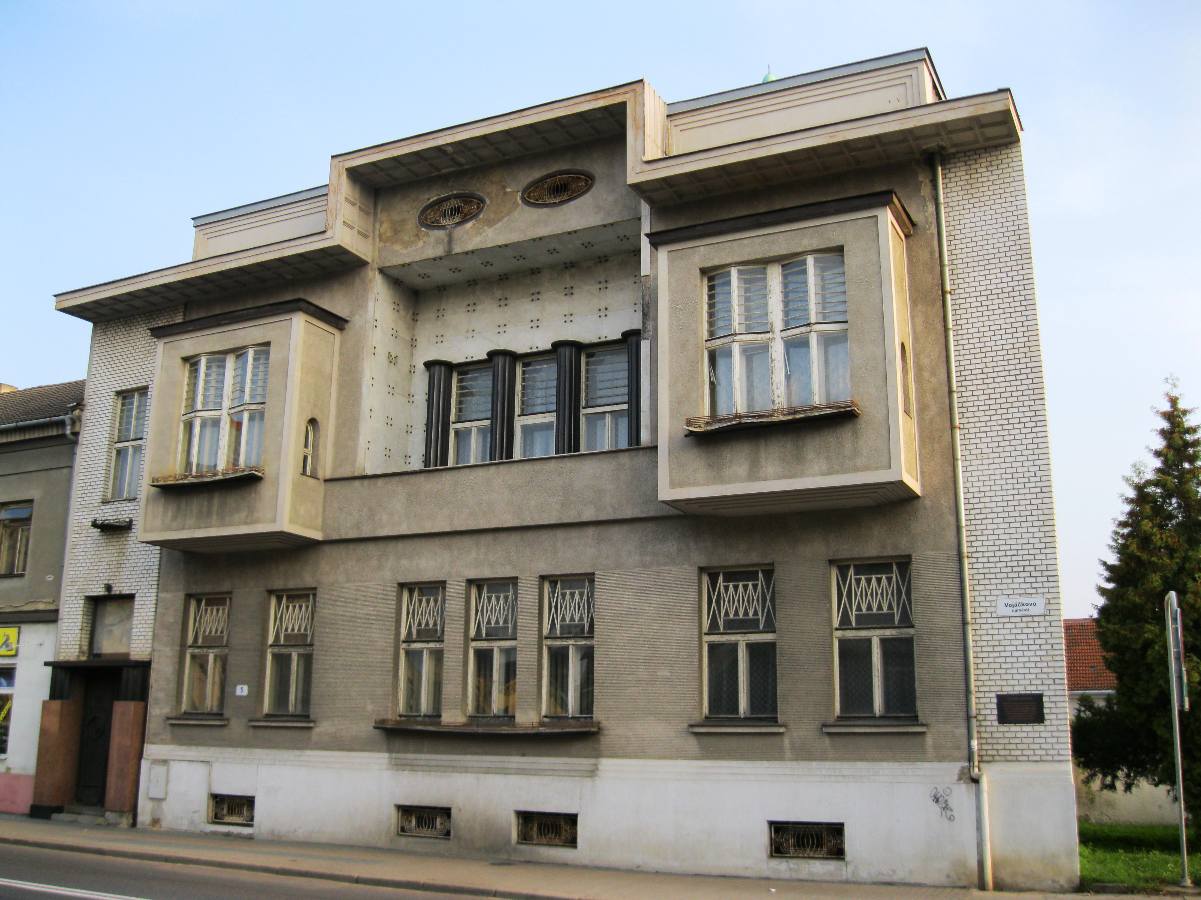 Rodinný dům Ing. Josefa Kovaříka (Prostějov), Vojáčkovo nám. 2944/5, Prostějov